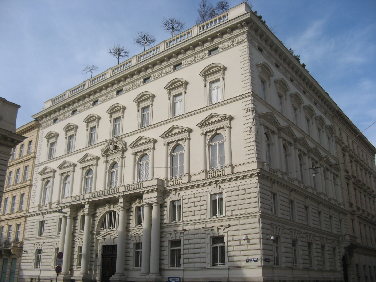 Ehemaliges Lützow-Palais (1870-72) von Carl von Hasenauer, Bösendorferstraße 13, Wien 1